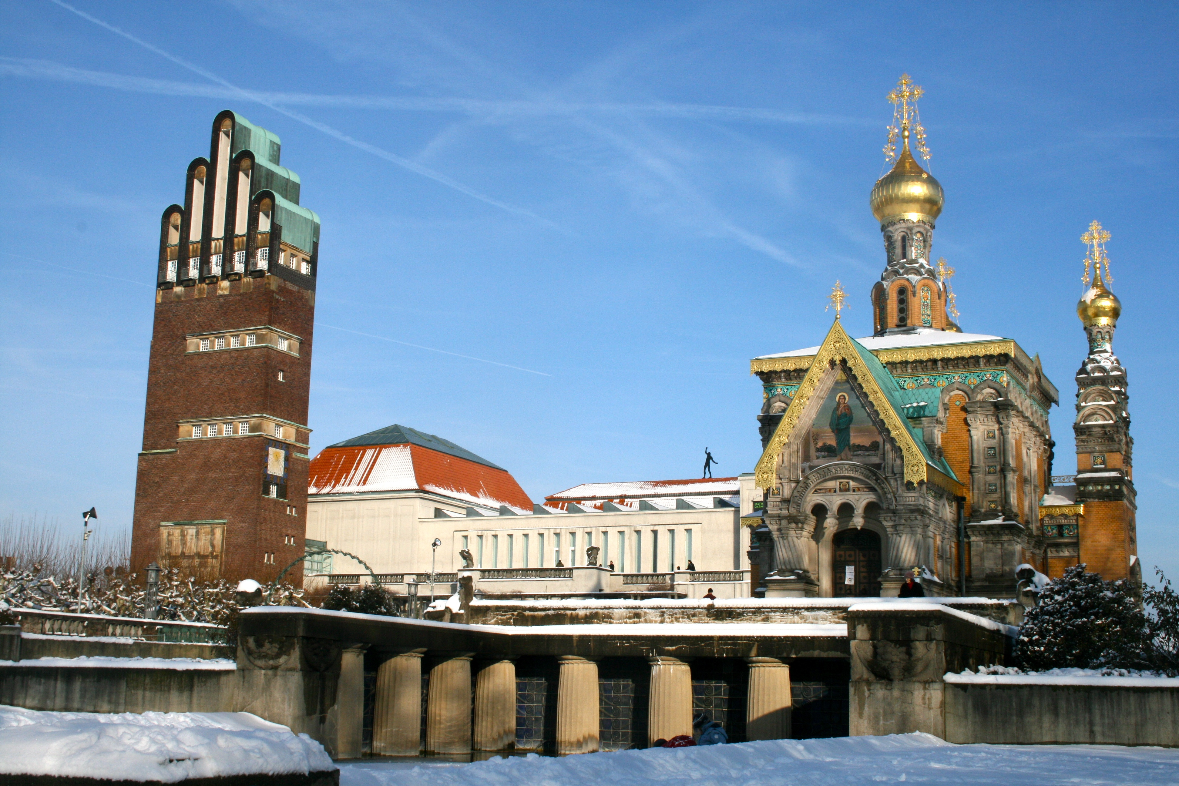 Mathildenhöhe View